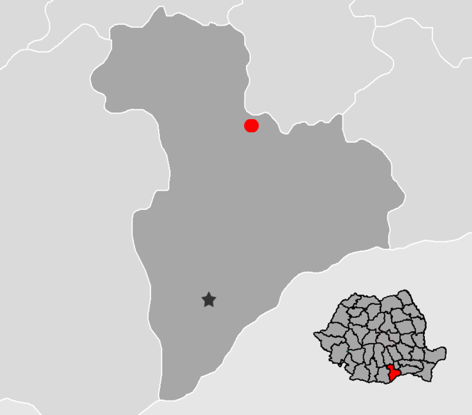 Source:Base Giurgiu.png